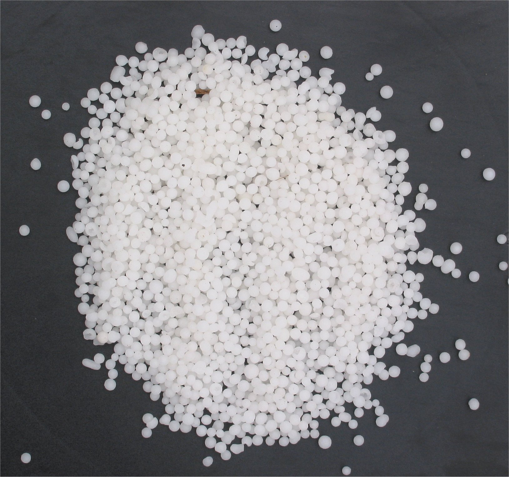 (Chilisalpeter) Sodium nitrate